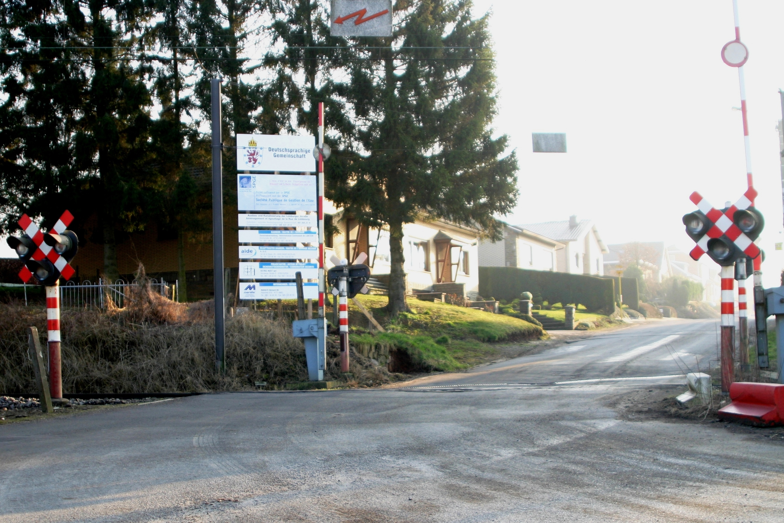 Barrière an der Limburgerstrasse zu Herbestal, direkt nieft der fréierer Rangéiergare.